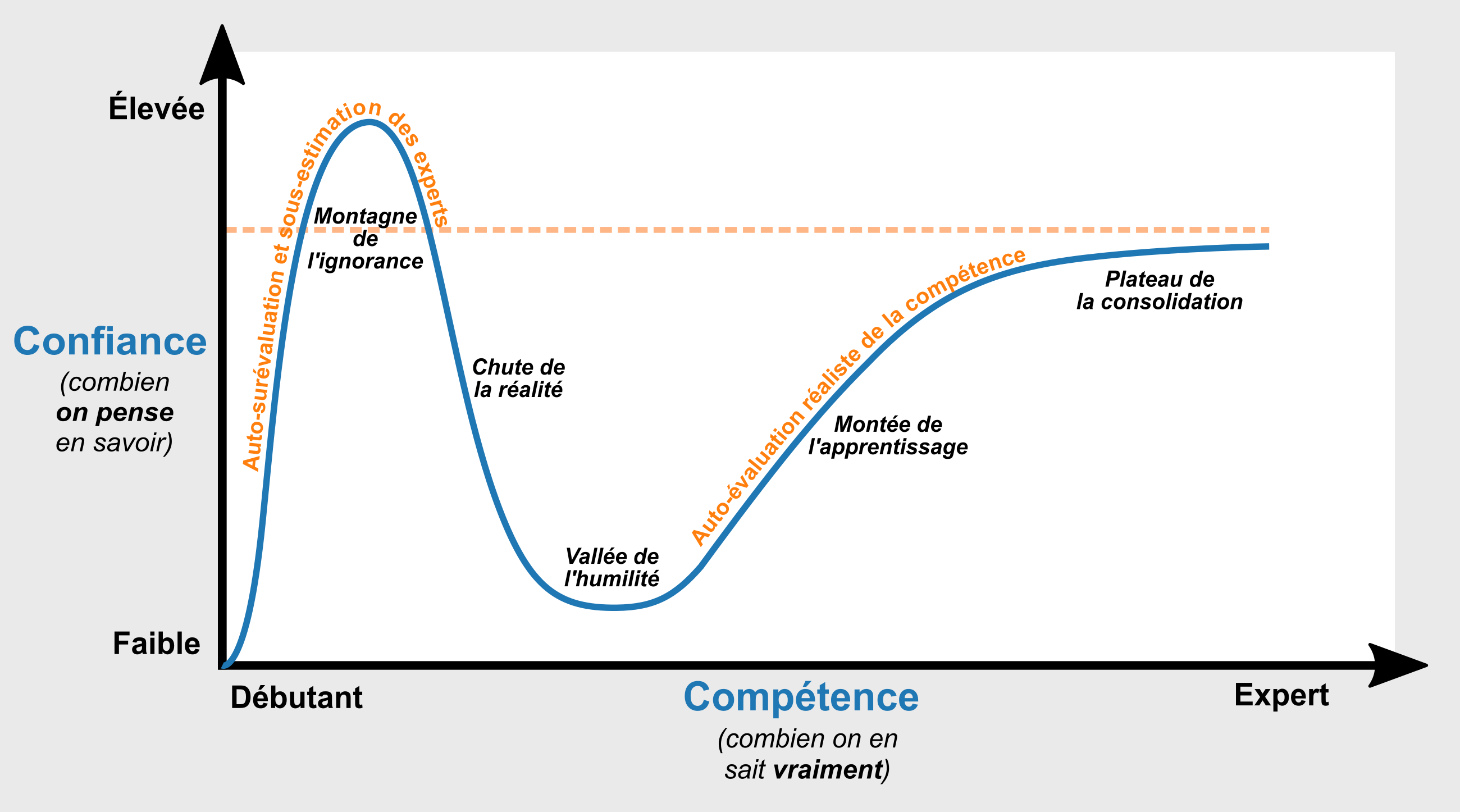 Schéma représentant la courbe d'apprentissage d'une compétence par rapport à l'auto-évaluation dans cette compétence.